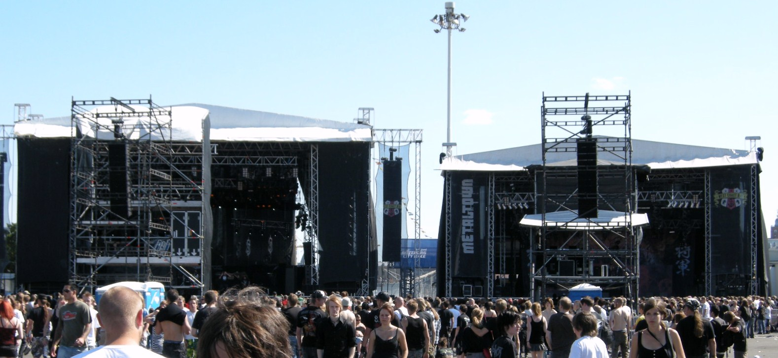 Metaltowns två stora scener, Black stage och Red stage, 2009